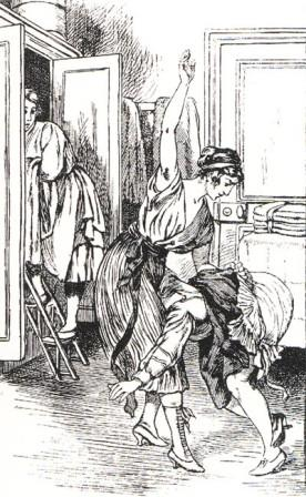 Dessins de Martin van Maële. Illustration de l'ouvrage de Pierre Mac Orlan La Comtesse au fouet, Jean Fort, coll, Paris, 1926.